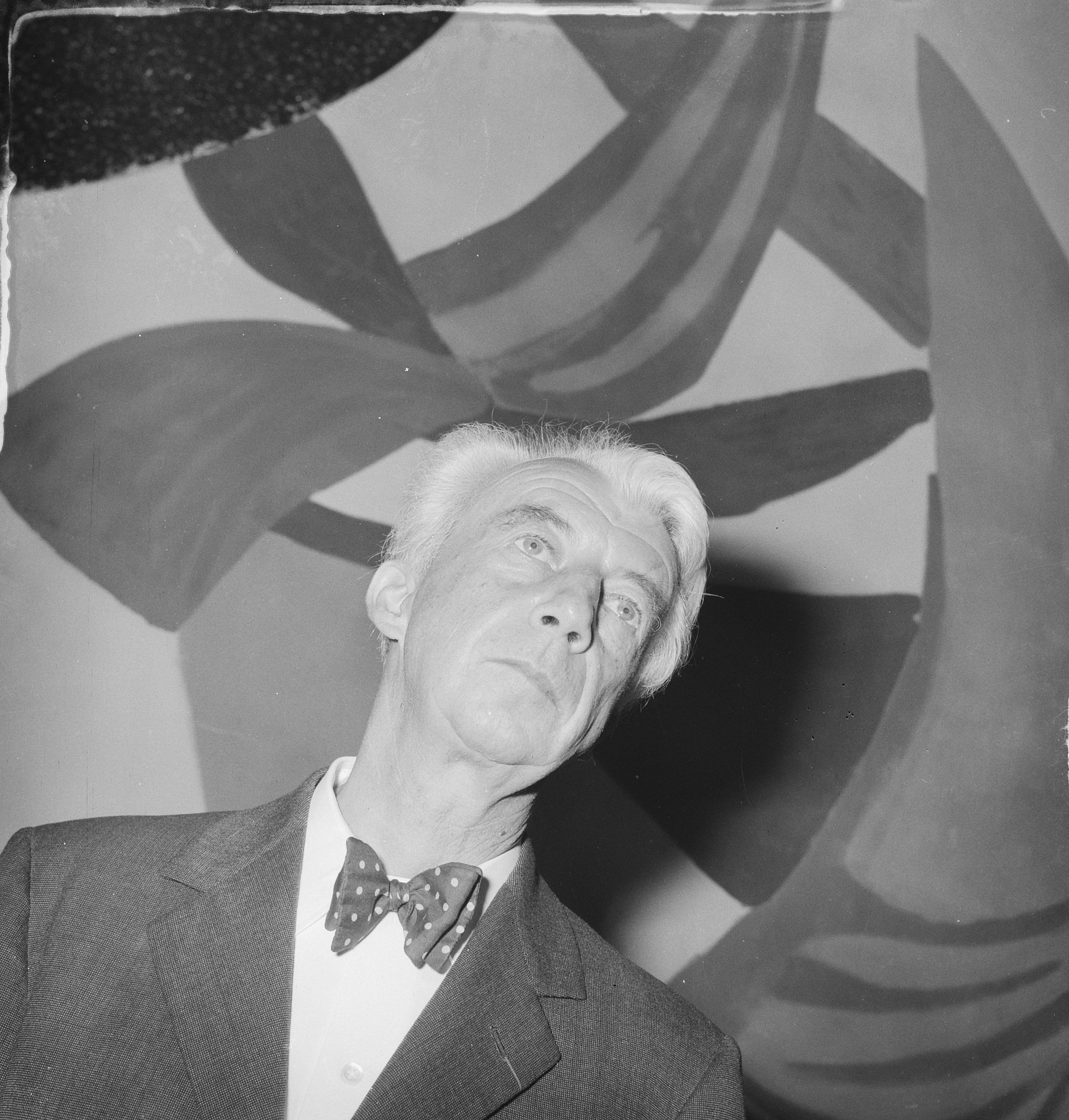 Afscheidsreceptie gehouden door wethouder Ab de Roos met de heer Sandberg (kop). Datum, 26 oktober 1962. Amsterdam (Nederland)